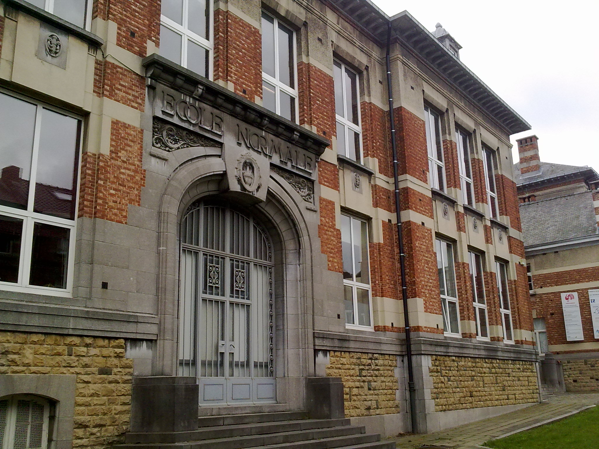 L'Ecole Normale de Nivelles en 2010